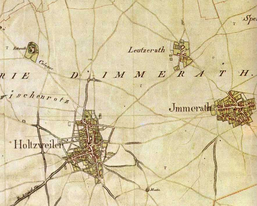 Mairie de Immerath (Erkelenz, D); Kartenaufnahme des Rheinlands von Tranchot/Müffling, (Aufnahme von 1806/07)